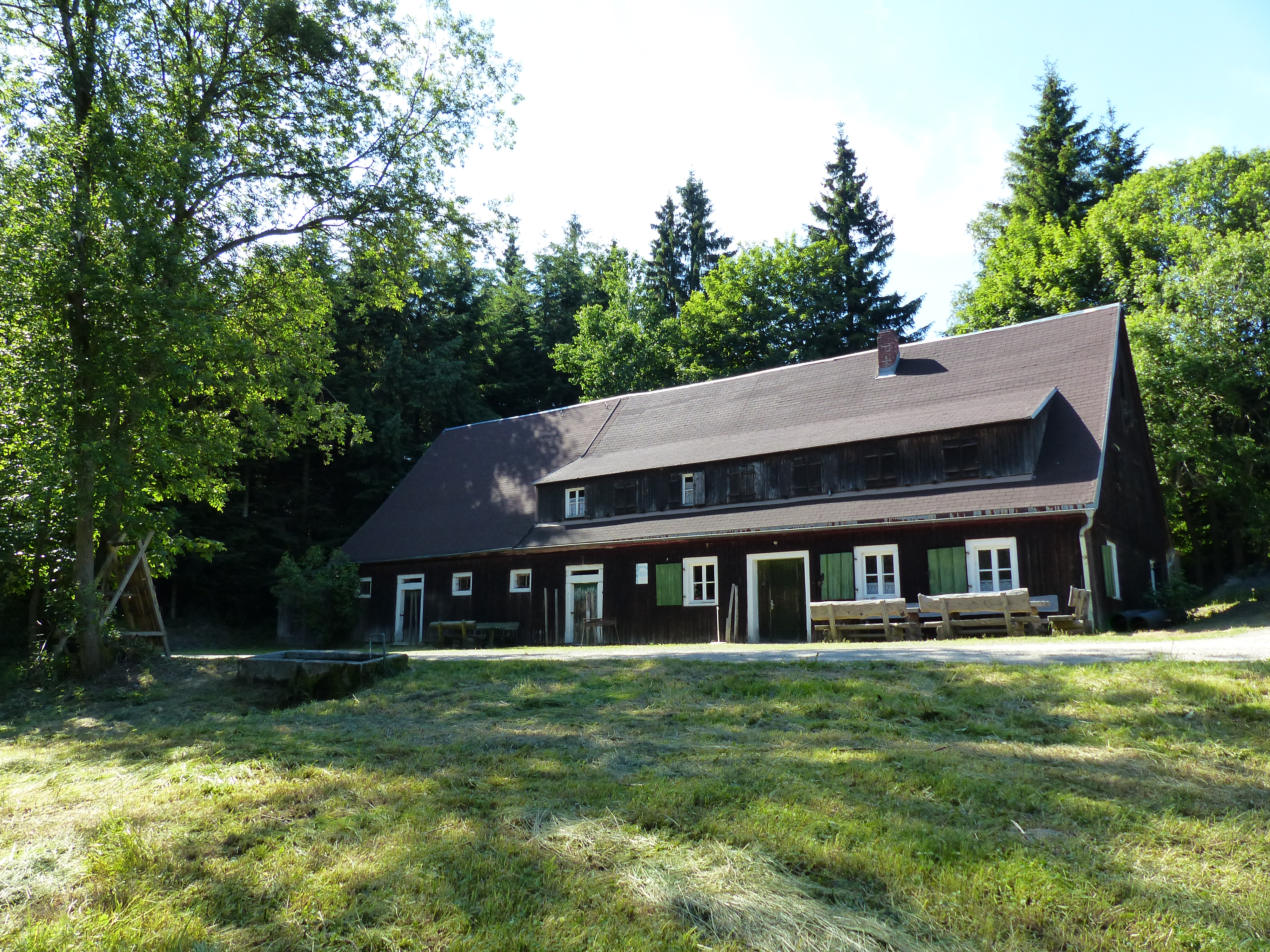 Ortsteil von Weißenstadt